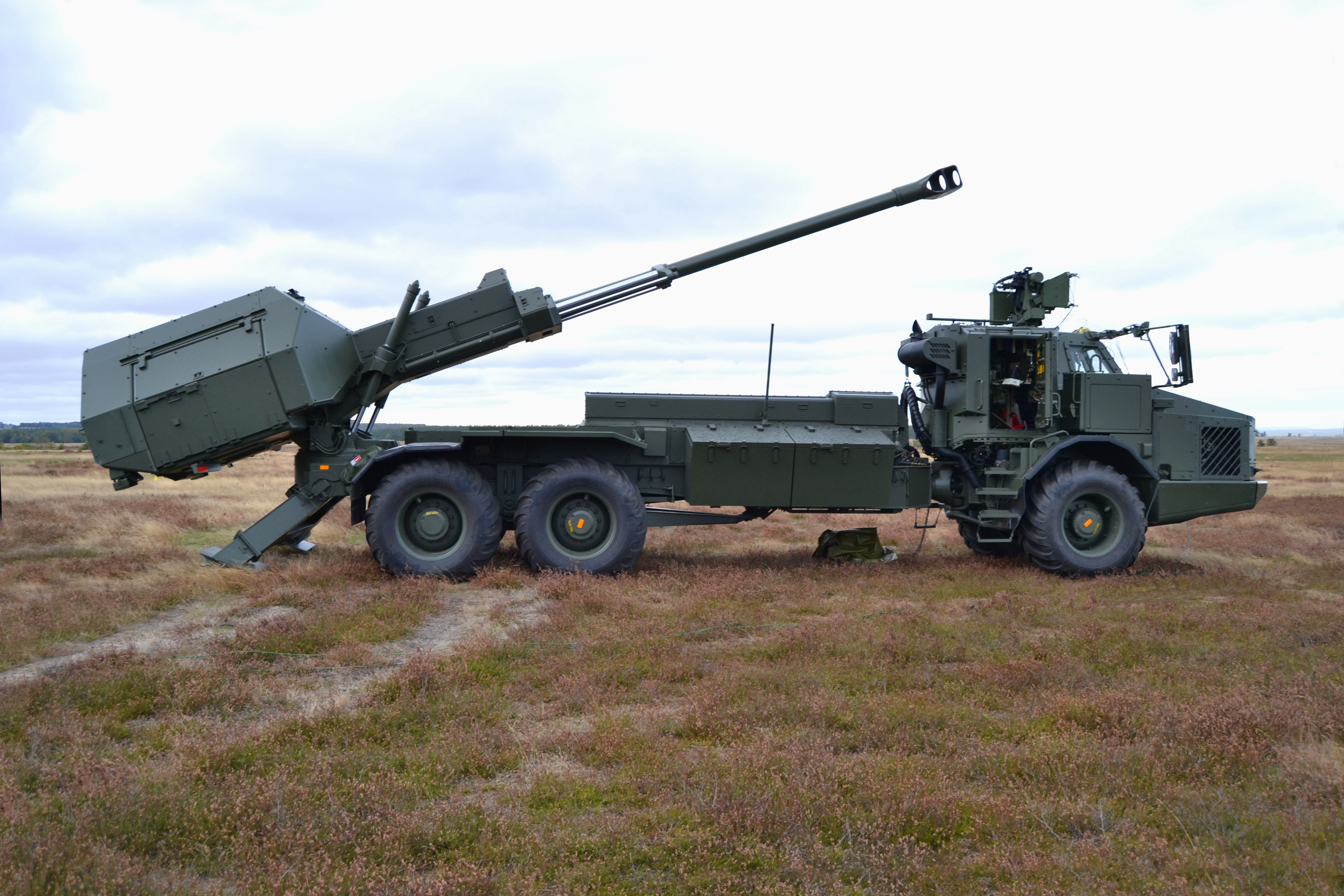 Archer i eldställning på Ravlunda skjutfält